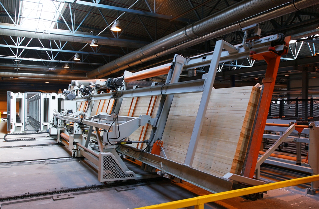 Производство клееного бруса, загрузка пресса. Сокольский ДОК, Россия